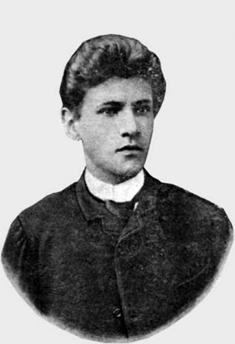 Владимир Арсеньев в юности. Фотография конца 80-х годов XIX века